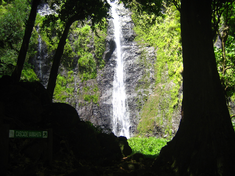 Photo cascade Vaimahuta à Tahiti (Photo personnel 2006) Utilisateur:FRED